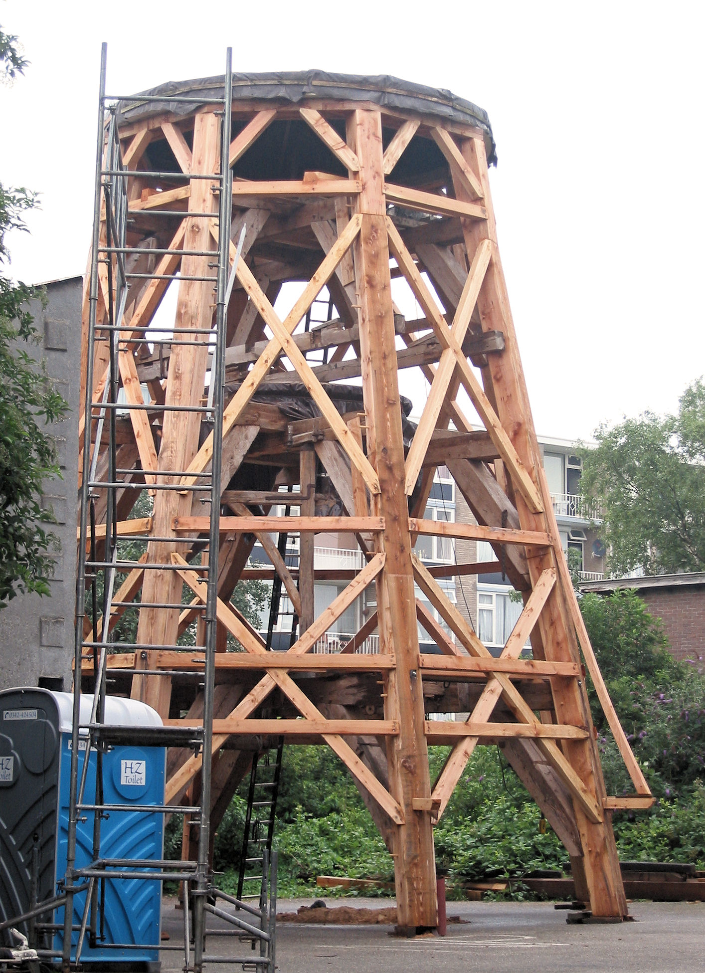 Gedeeltelijk gerestaureerde houten achtkant van de Concordia molen te Ede 23 juni 2007